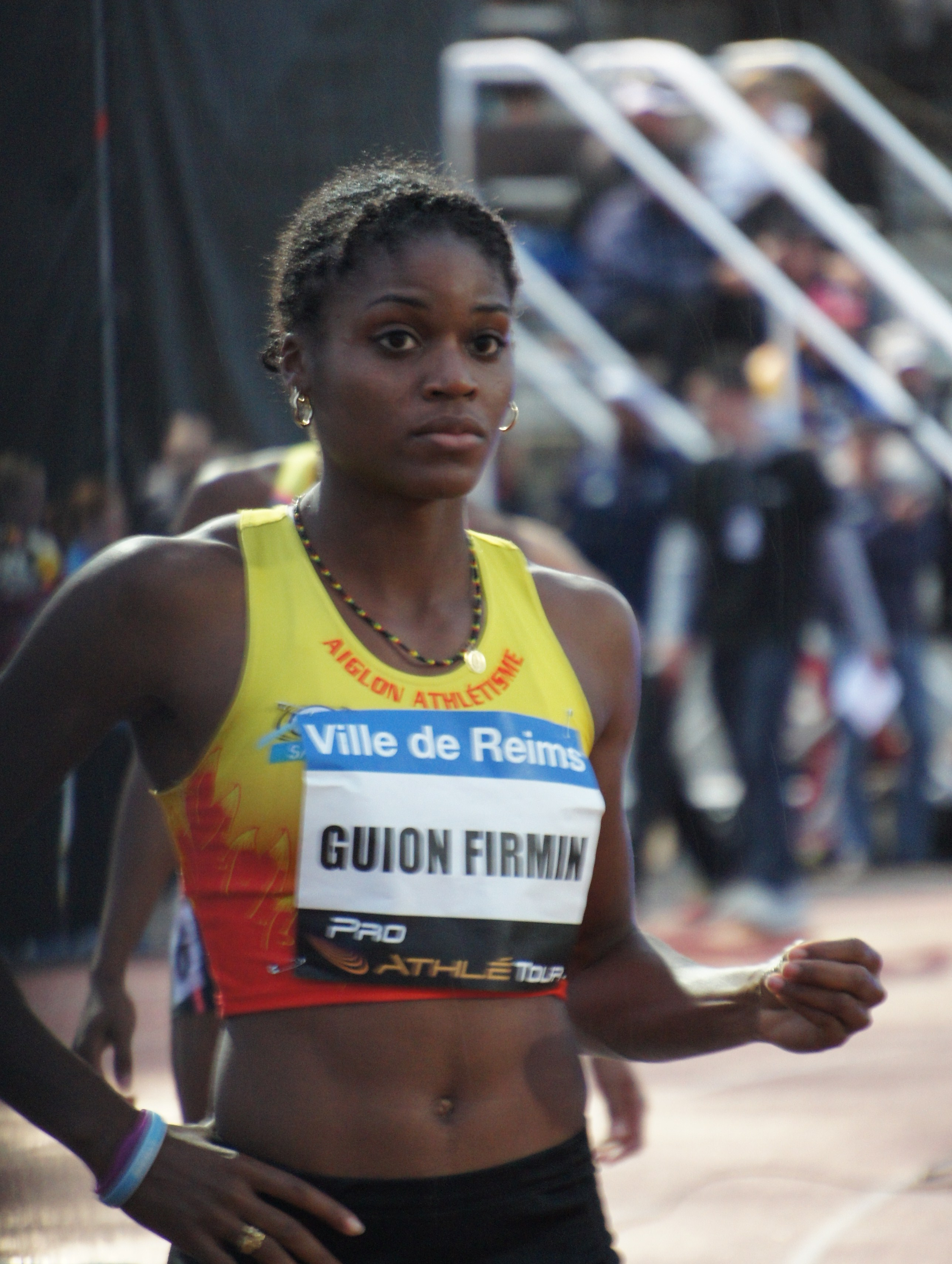 Lenora Guion-Firmin lors des Rencontres d'athlétisme de Reims 2013.